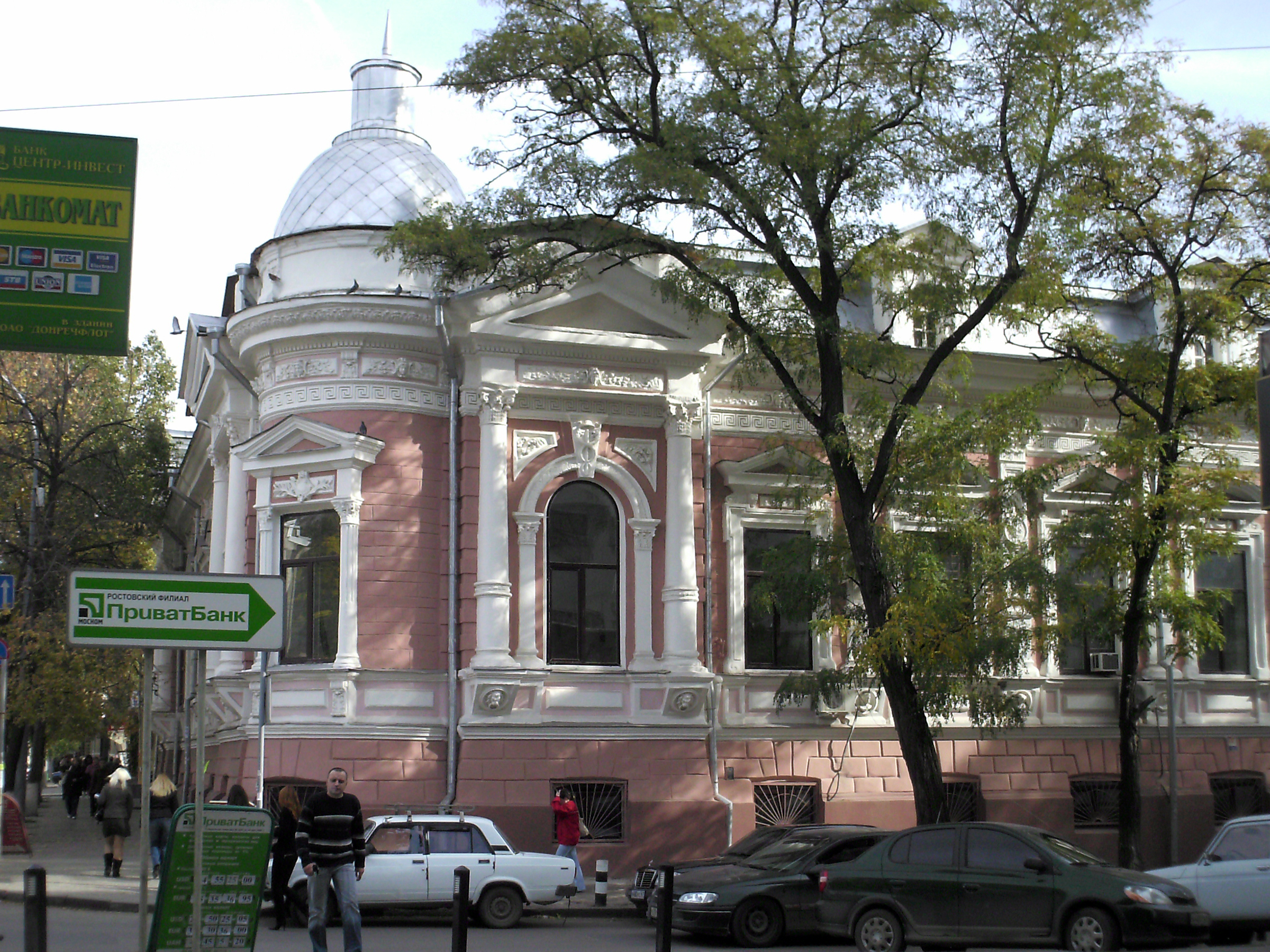 вул. Радянська: Ростов на Дону